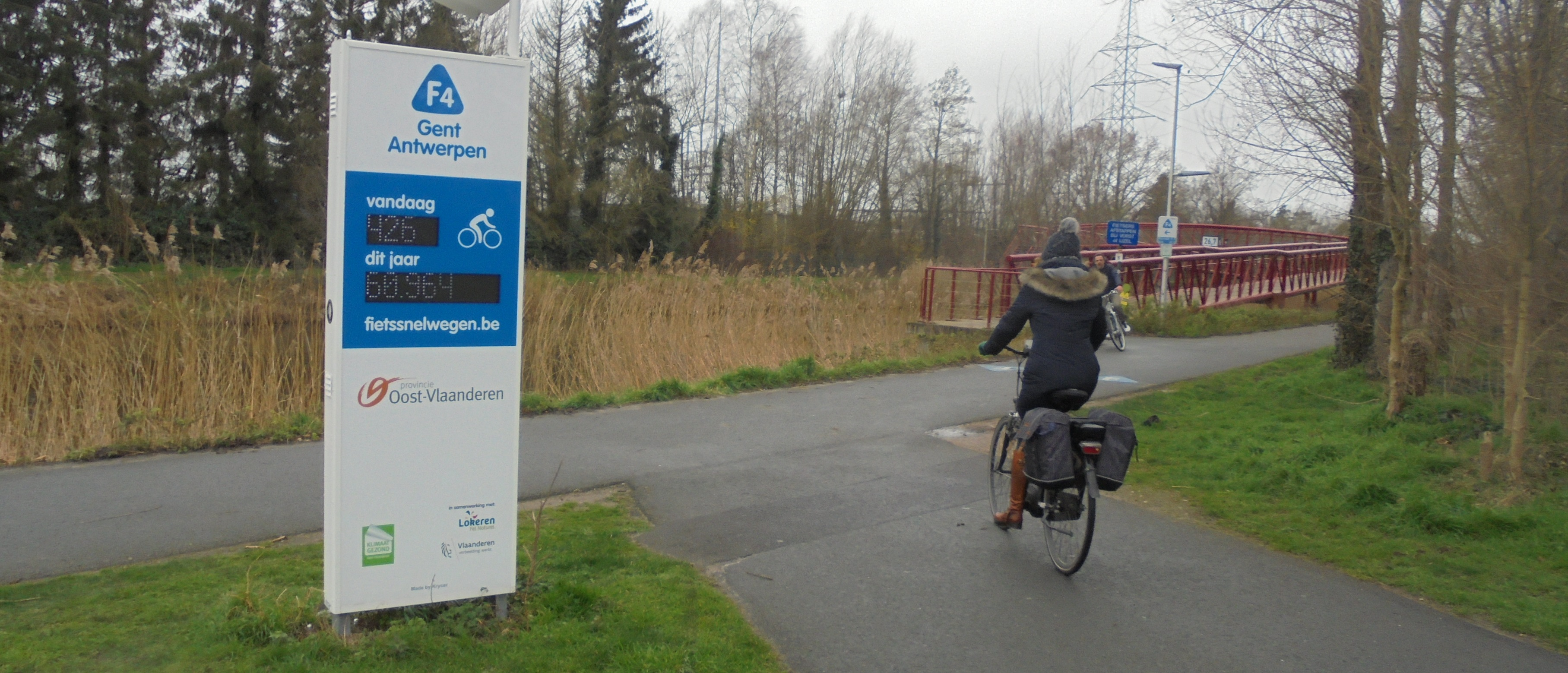 Fietssnelweg F4 nabij de Durme in Lokeren - Oost-Vlaanderen - België.